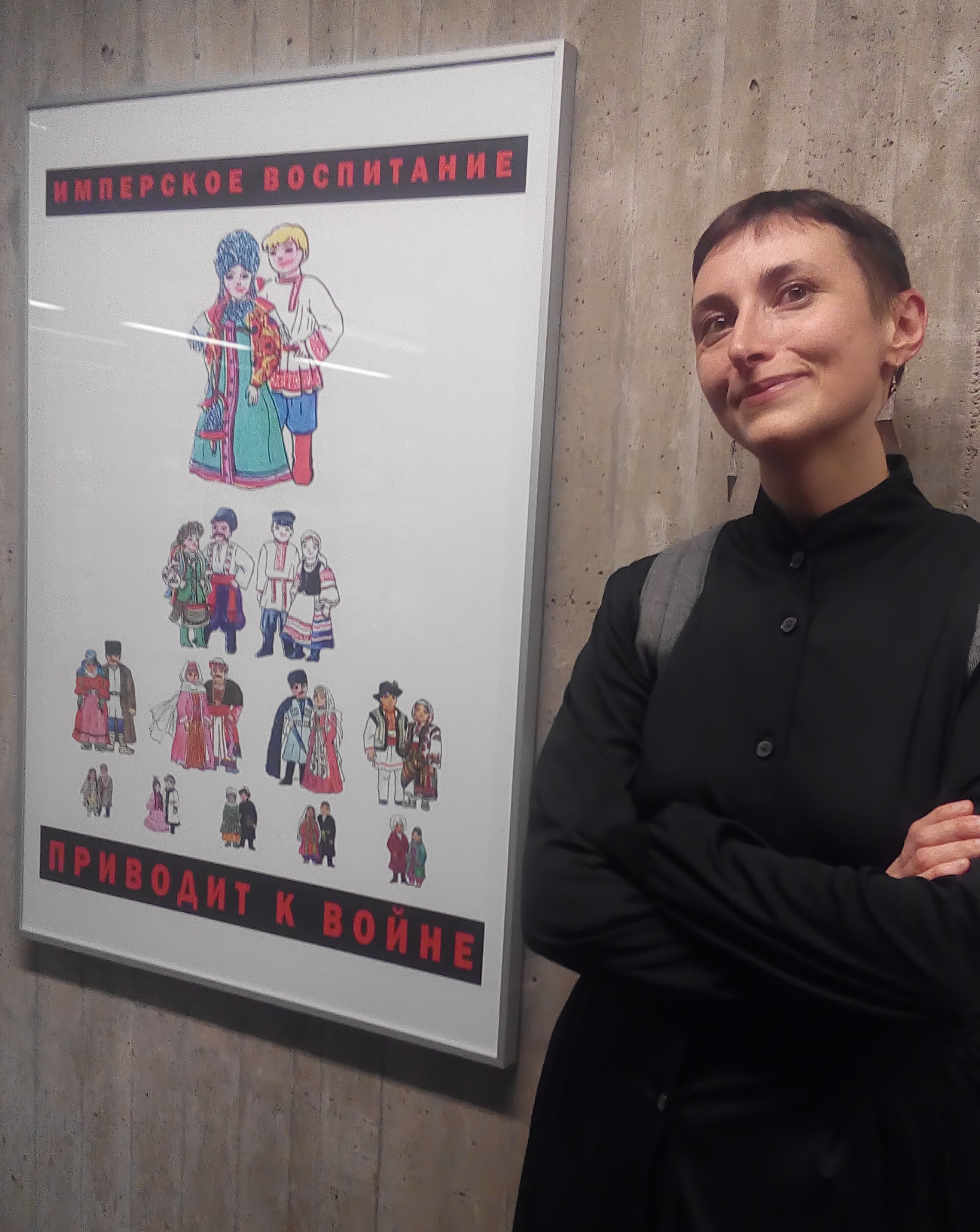 Viktoria Lomasko bei der Ausstellungseröffnung in der Bibliothek der Ruhr-Universität Bochum